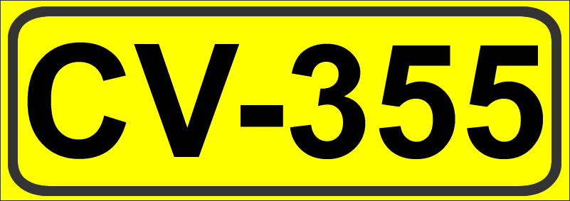 Inidcador de la Carretera de la Comunidad Valenciana CV-355